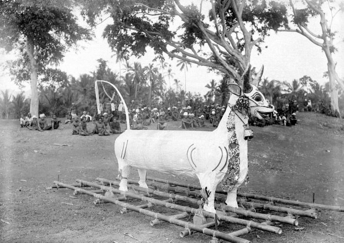 Negatief. 'Patulangan' (doodskist) in de vorm van een rund bij een lijkverbranding in Karangasem, Bali